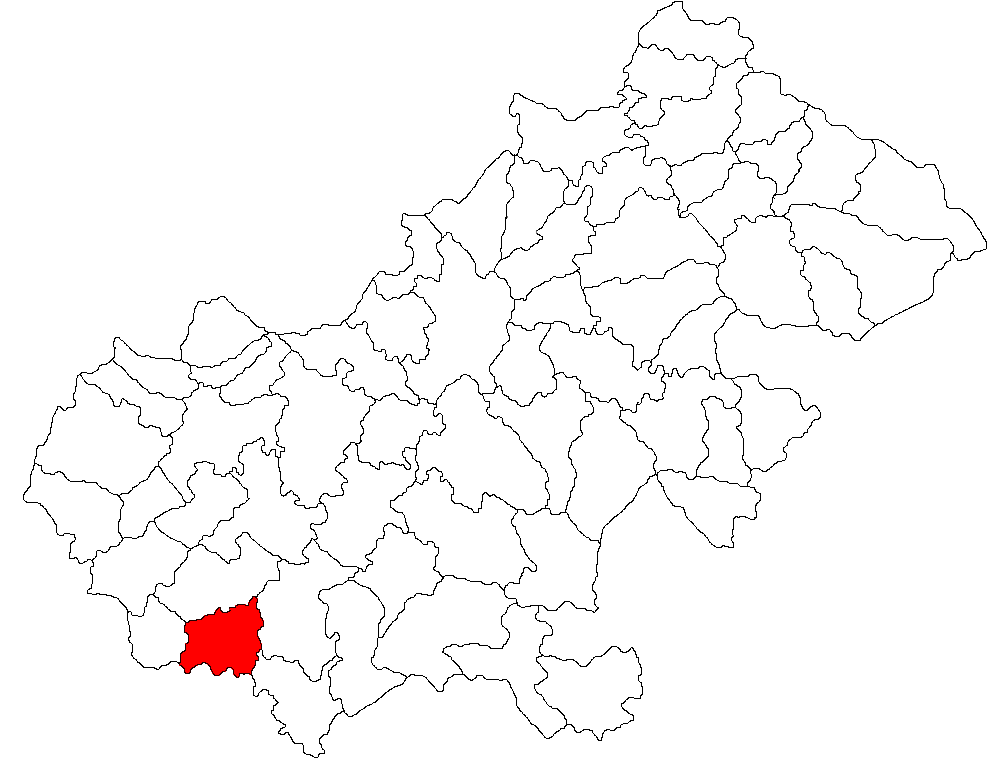 Categorie:Hărţi ale judeţului Satu Mare